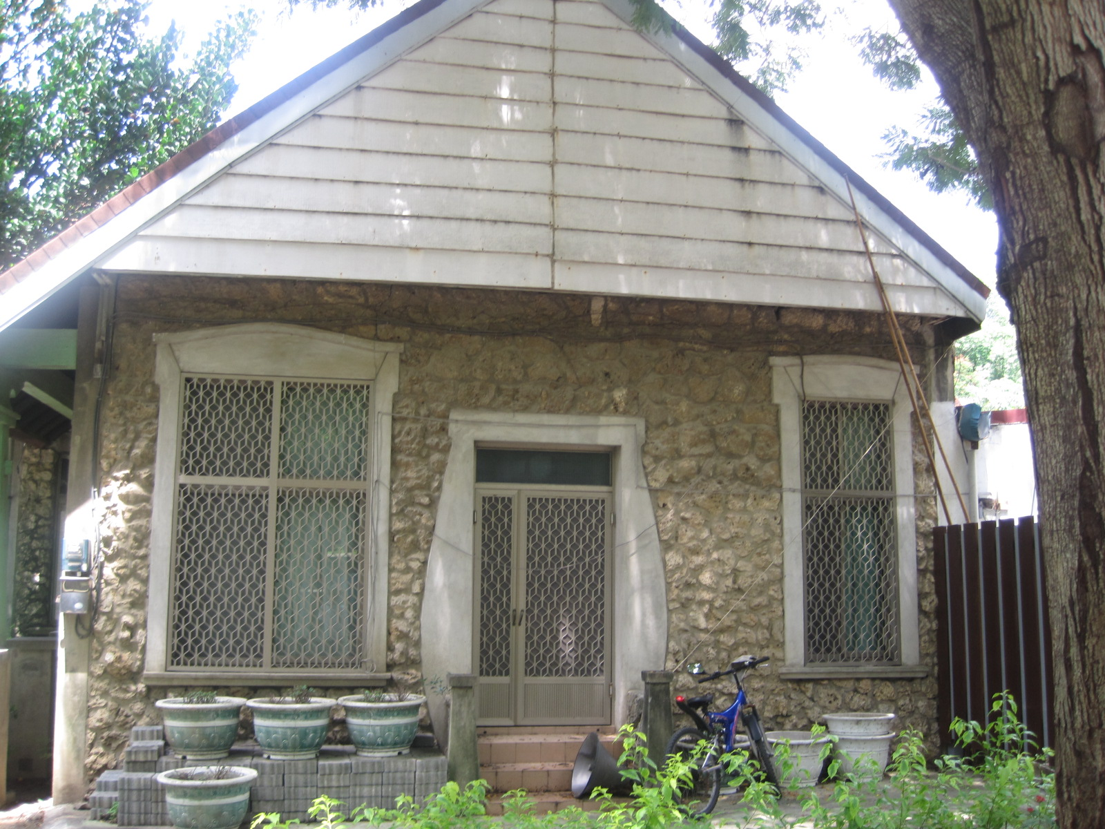 原臺南公園管理所側面